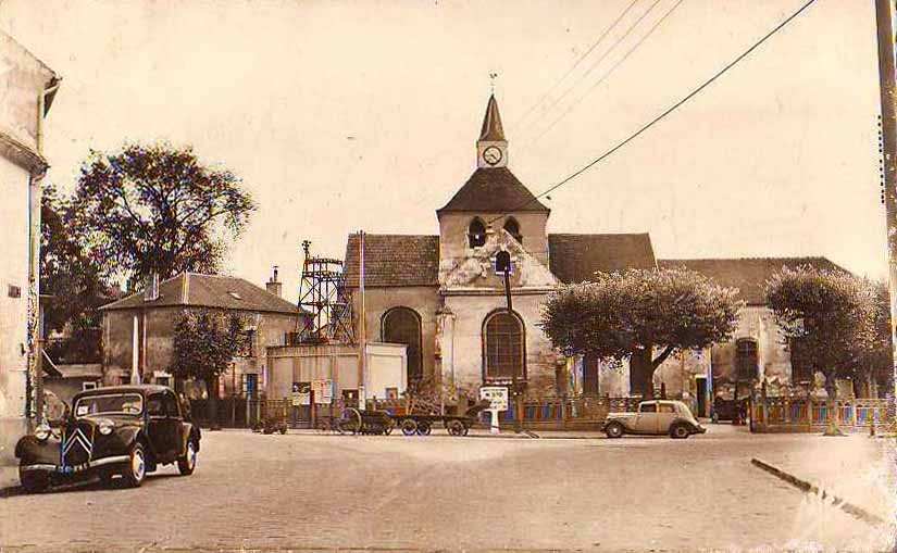 Aulnay-sous-Bois: Eglise Saint-Sulpice